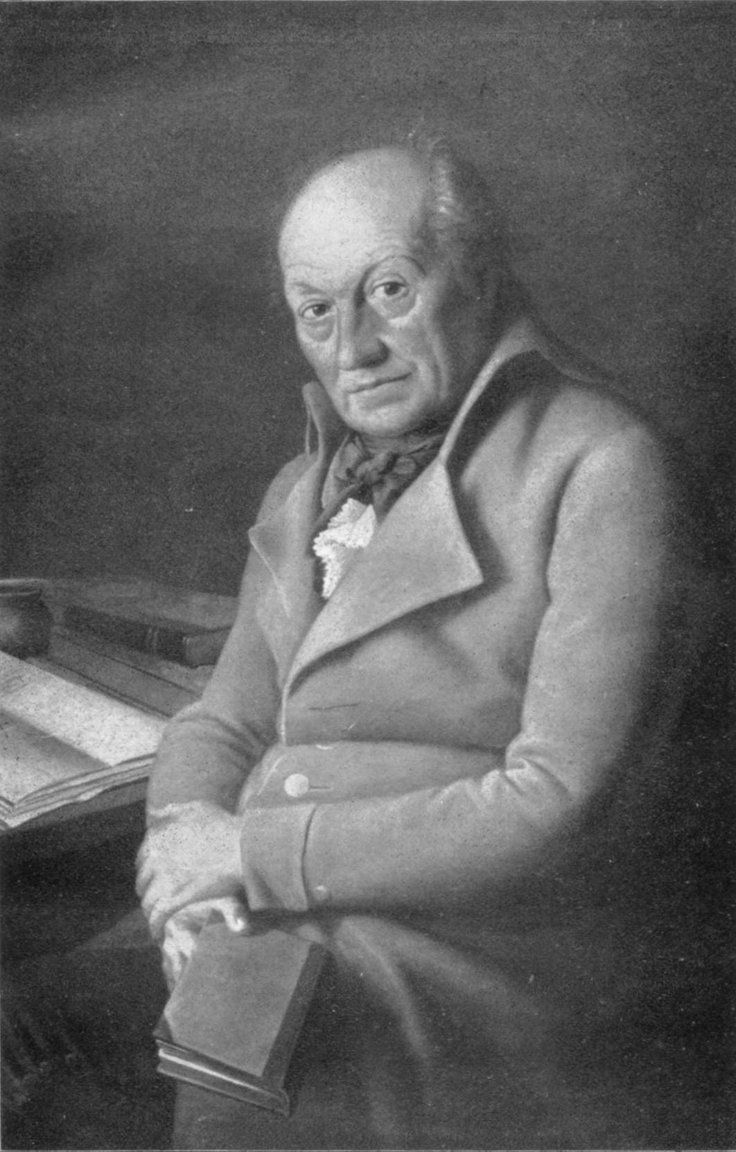 Porträt von Johann Georg Hartmann (1731–1811).